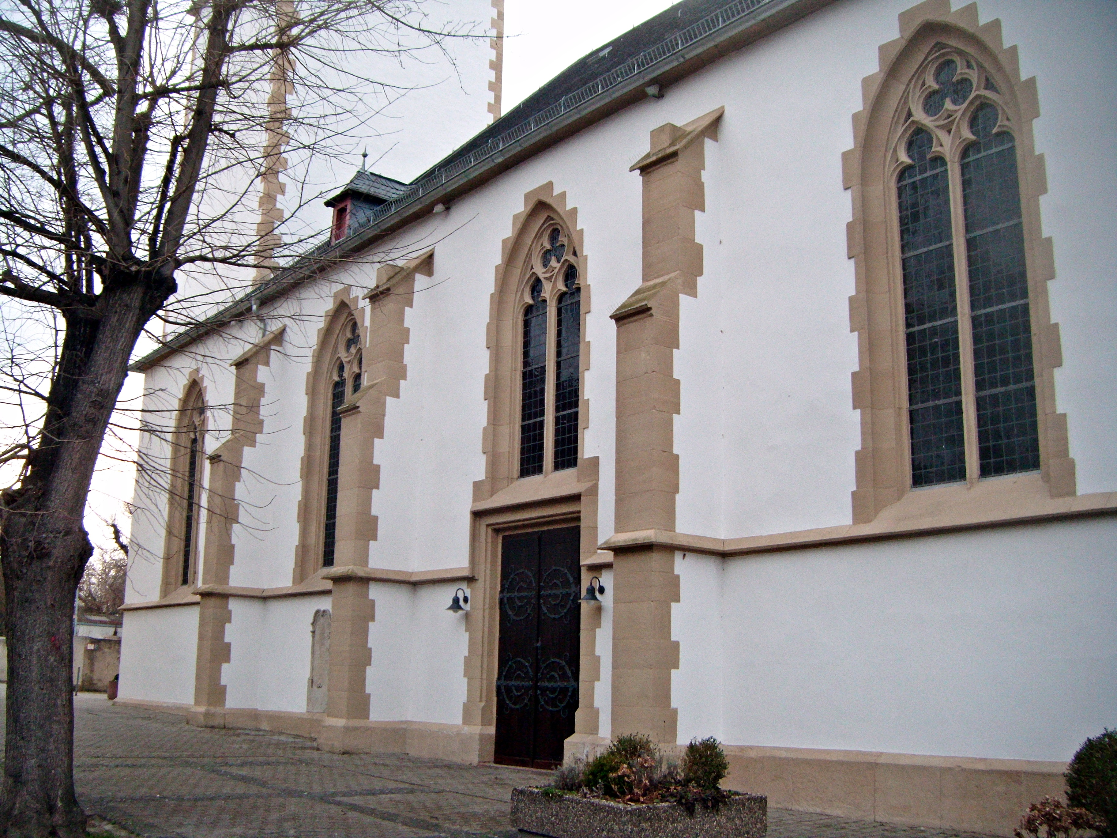 Gau-Odernheim Simultankirche, Langhaus